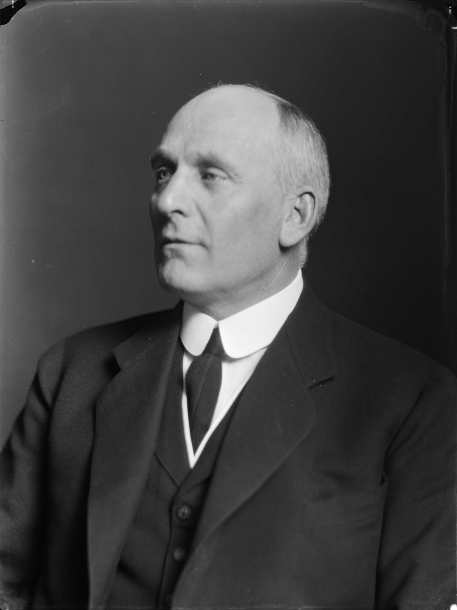 Skipsreder Olaf Ditlev-Simonsen, fotografert 1920